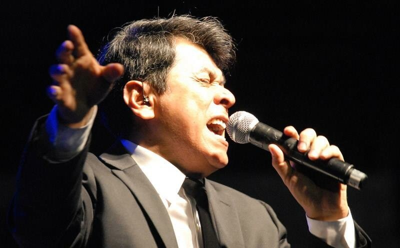 Concierto gira 2015 en Cuba